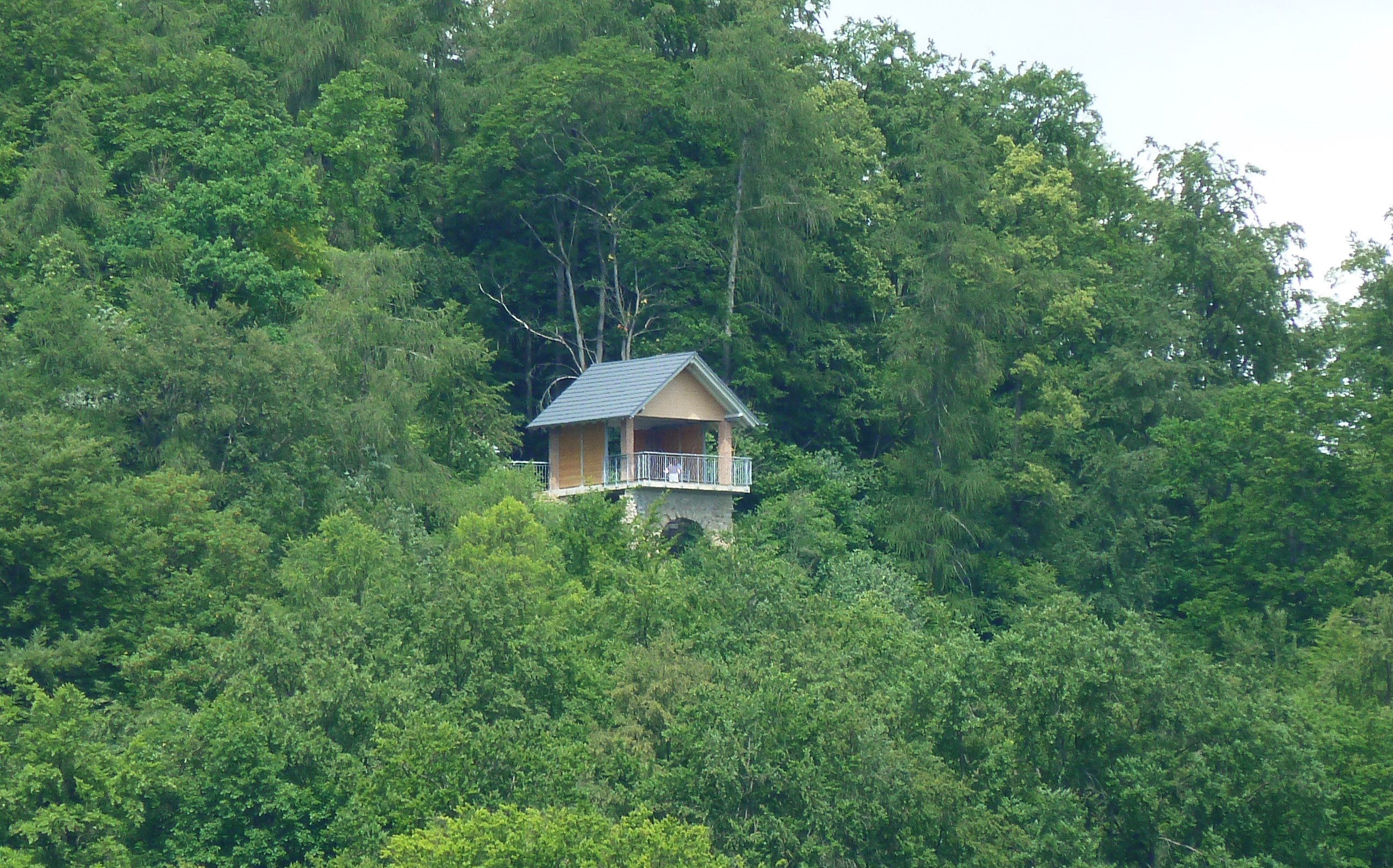 Das Diezhäuschen, eine Aussichts- und Wanderhütte 80 Meter über der Stadt Meiningen, benannt nach dem Maler Samuel Friedrich Diez (1803-1873).